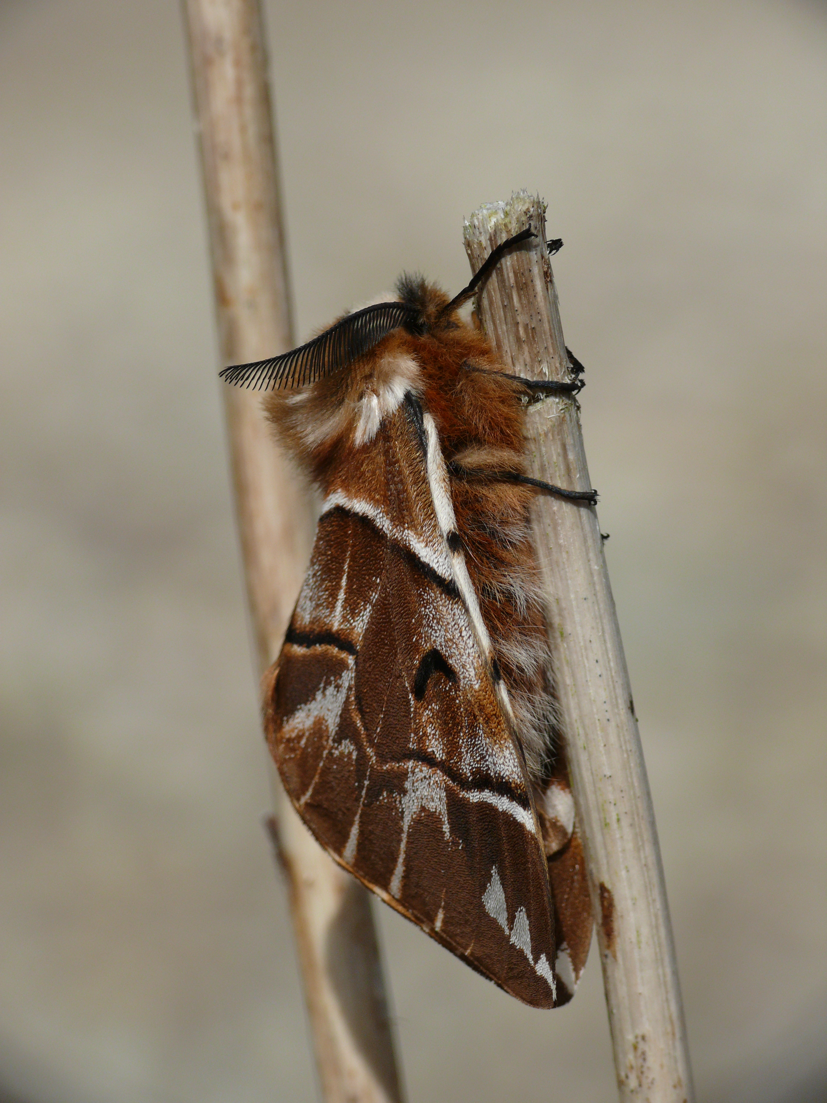 Birkenspinner Endromis versicolora, Buch am Buchrain, Bayern Aufgenommen während einer Exkursion des Arbeitskreises Schmetterlinge der Kreisgruppe München beim Landesbund für Vogelschutz (LBV).